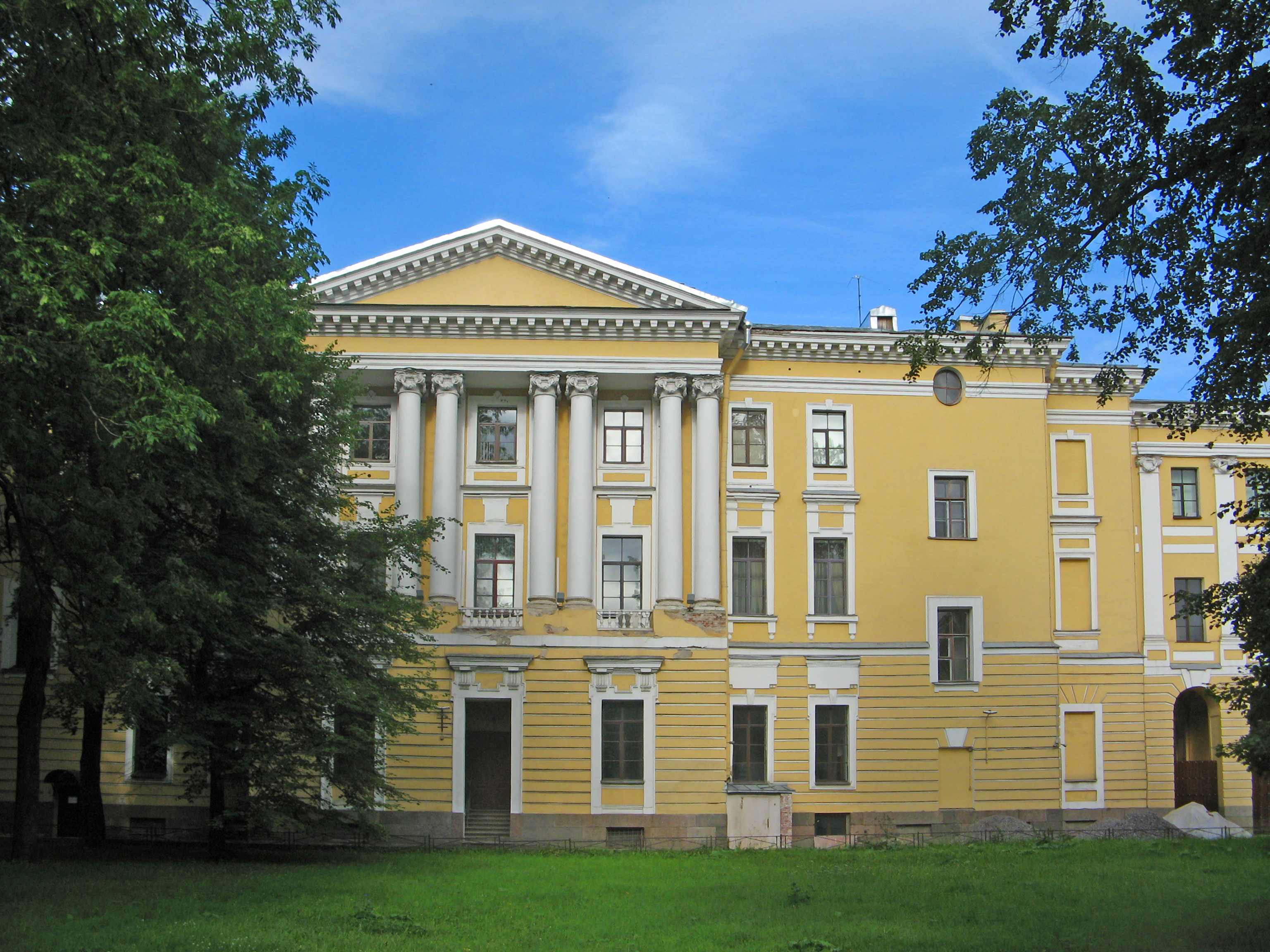 Александровский институт: улица Смольного, 3, Смольная набережная, Центральный район, Санкт-Петербург